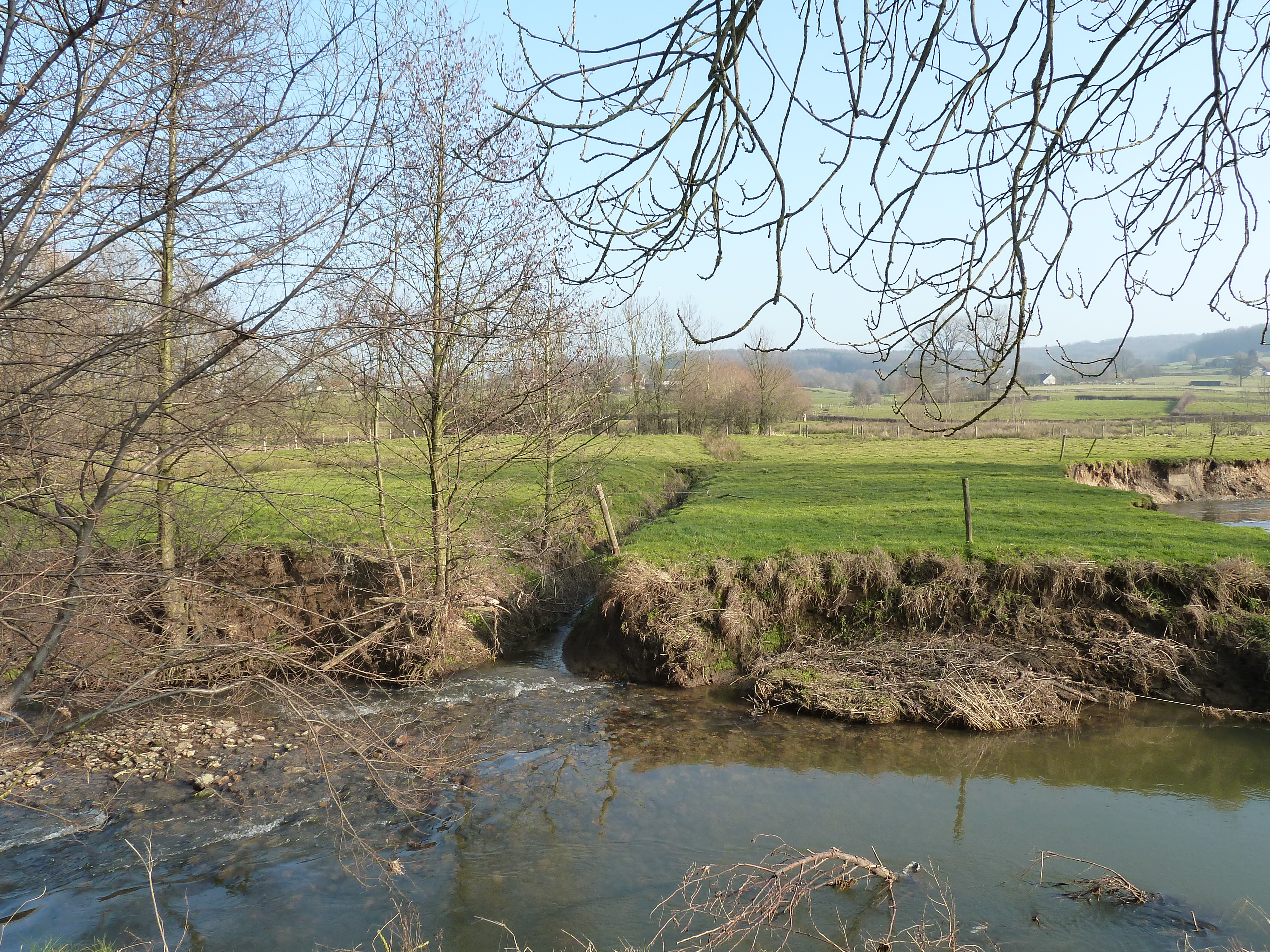 Klitserbeek, Gulpen-Wittem, Limburg, Nederland